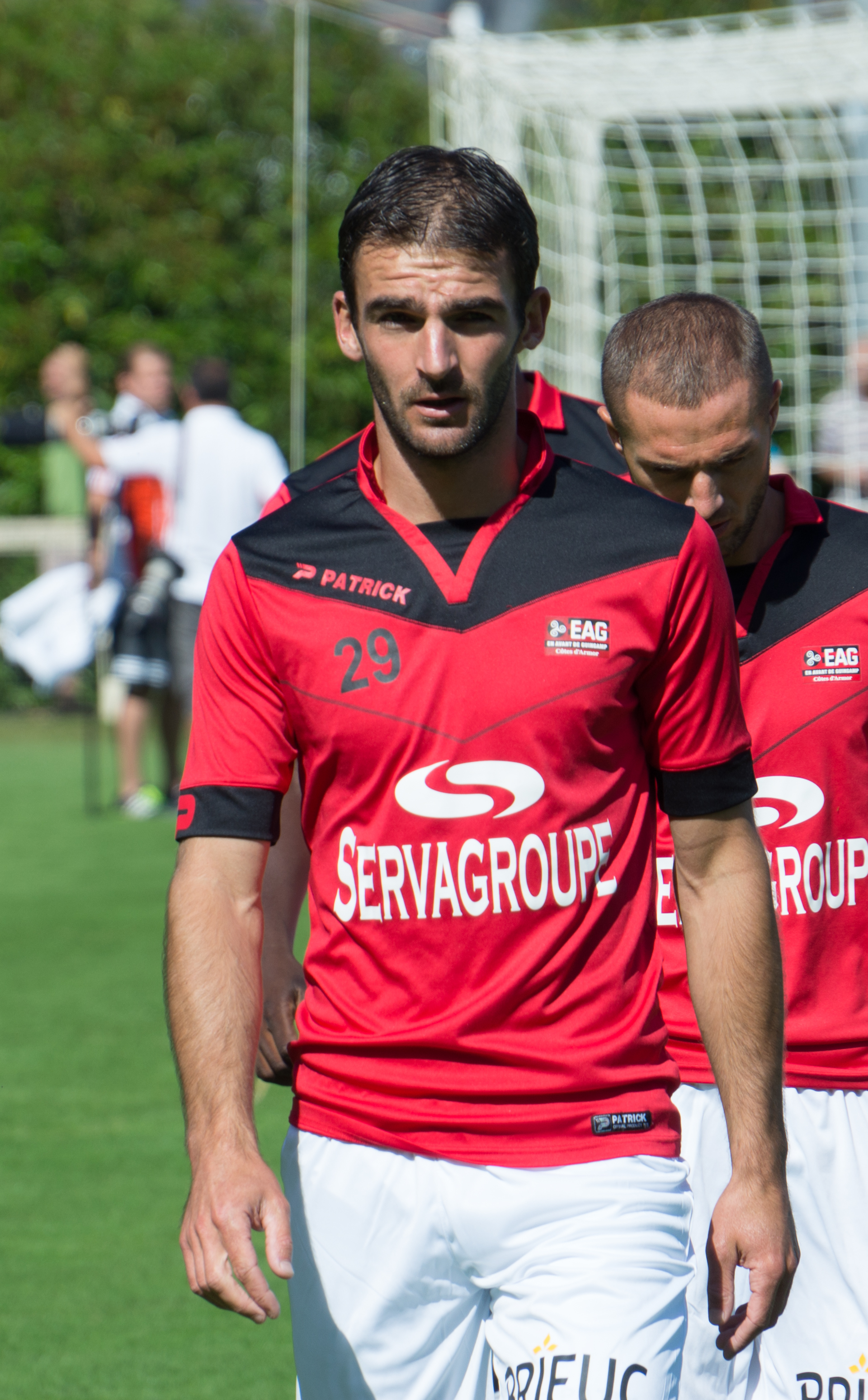 Christophe Kerbrat le 24 juillet 2016